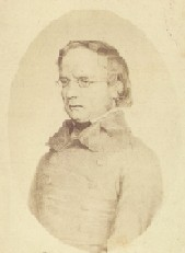 Foto di Vincenzo Gioberti (1801 – 1852) vivente scattata dall'autore morto oltre 70 anni fa da oggi